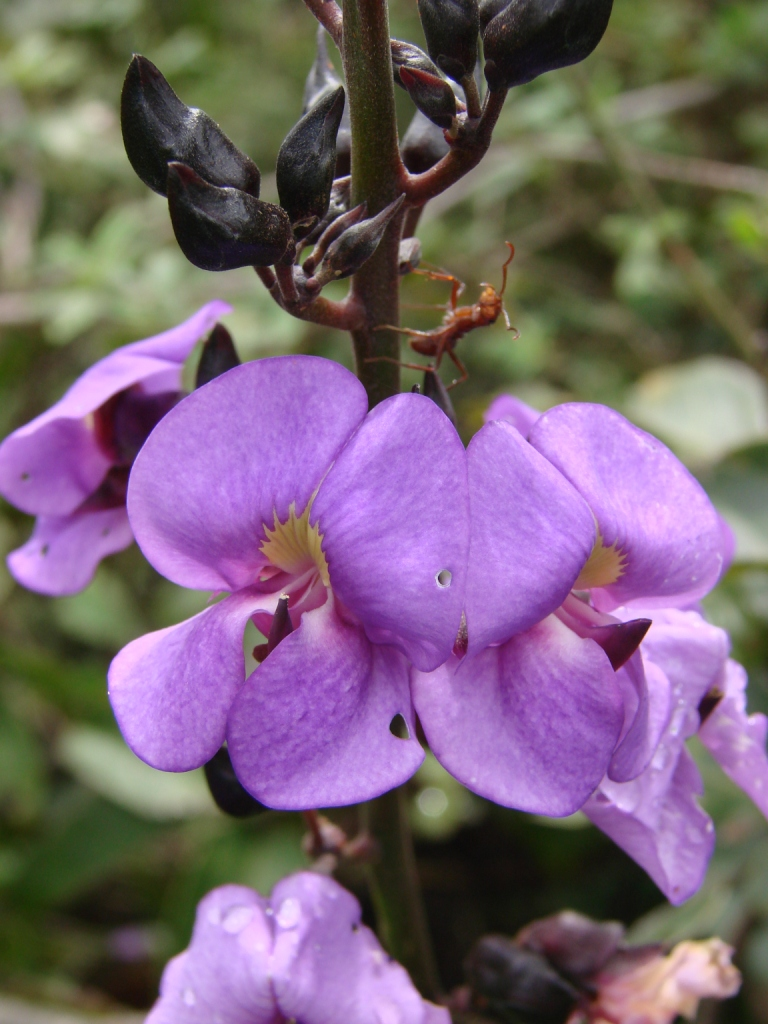 Dioclea grandiflora - FABACEAE - BR 242 - Cristópolis - Bahia - Brasil.